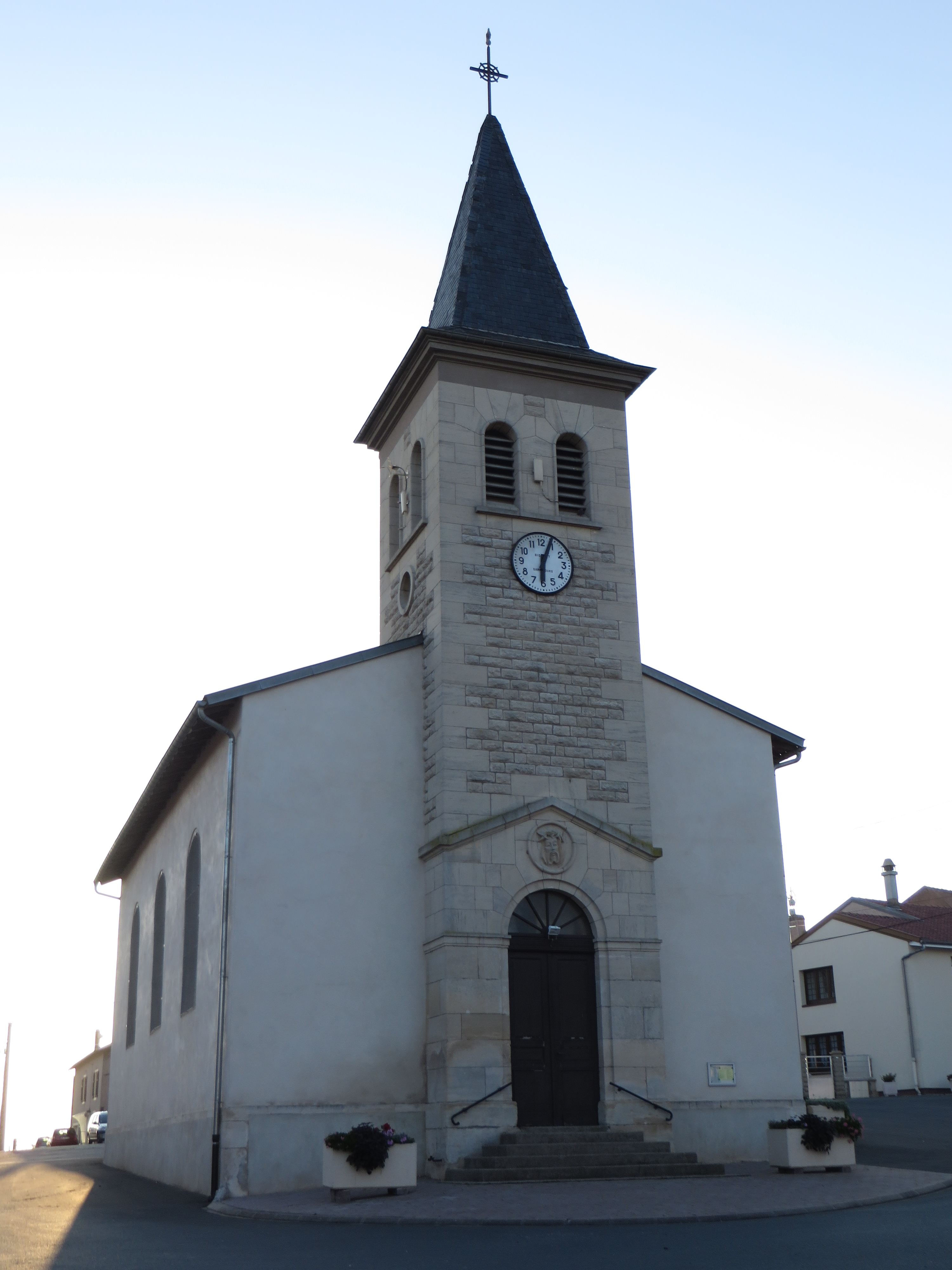 Villers-sur-Nied l'église Saint-Oswald